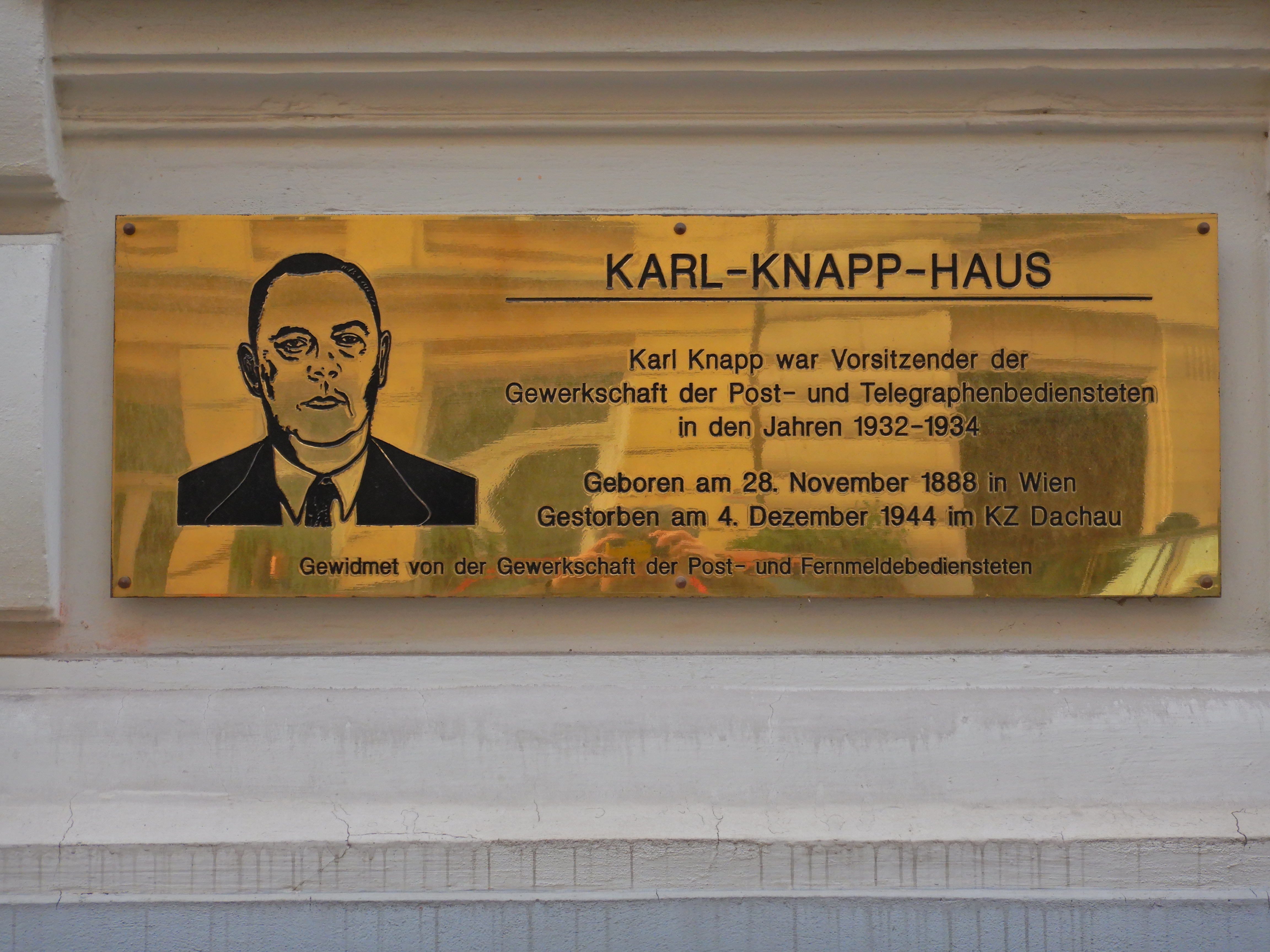 Gedenktafel für NS-Opfer (Wien, Biberstraße 5, Karl Knapp)